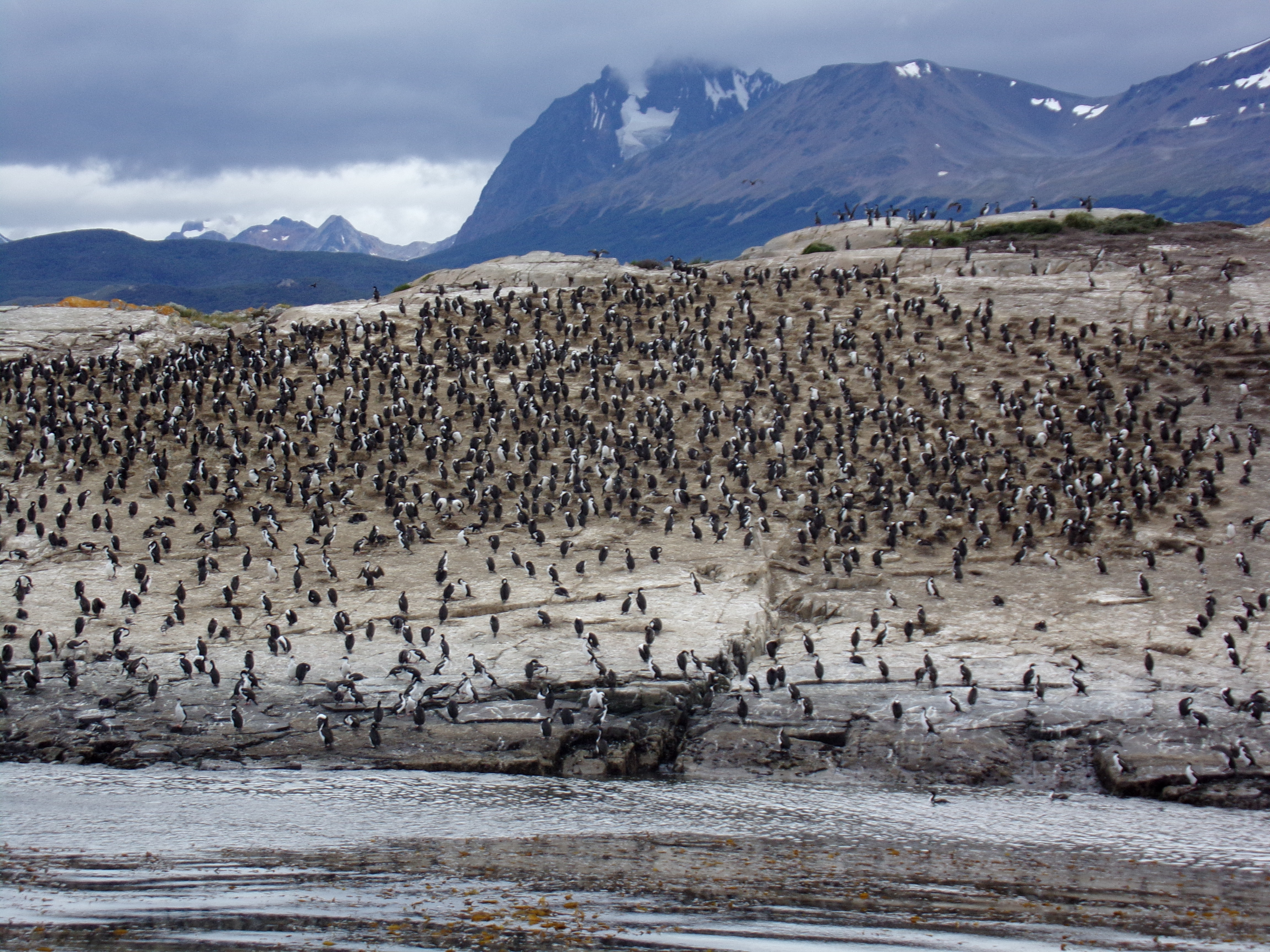 Bahía Ushuaia, Canal Beagle, TDF, Arg